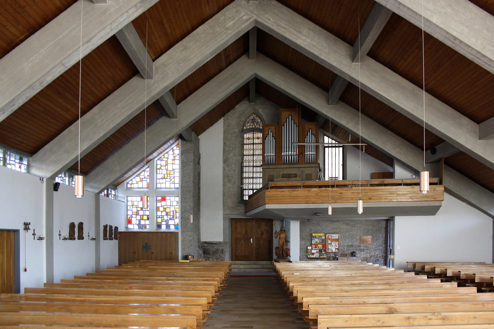 Zubau der Pfarrkirche von Desselbrunn; Ansicht Richtung Empore.